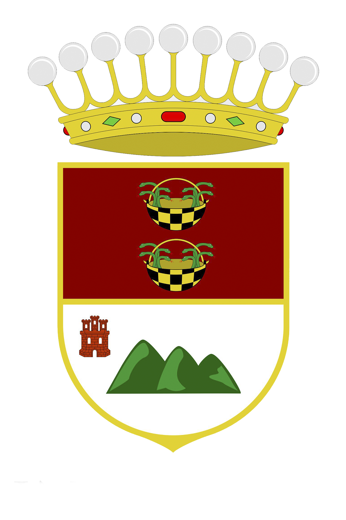 Escudo oficial de Frigiliana